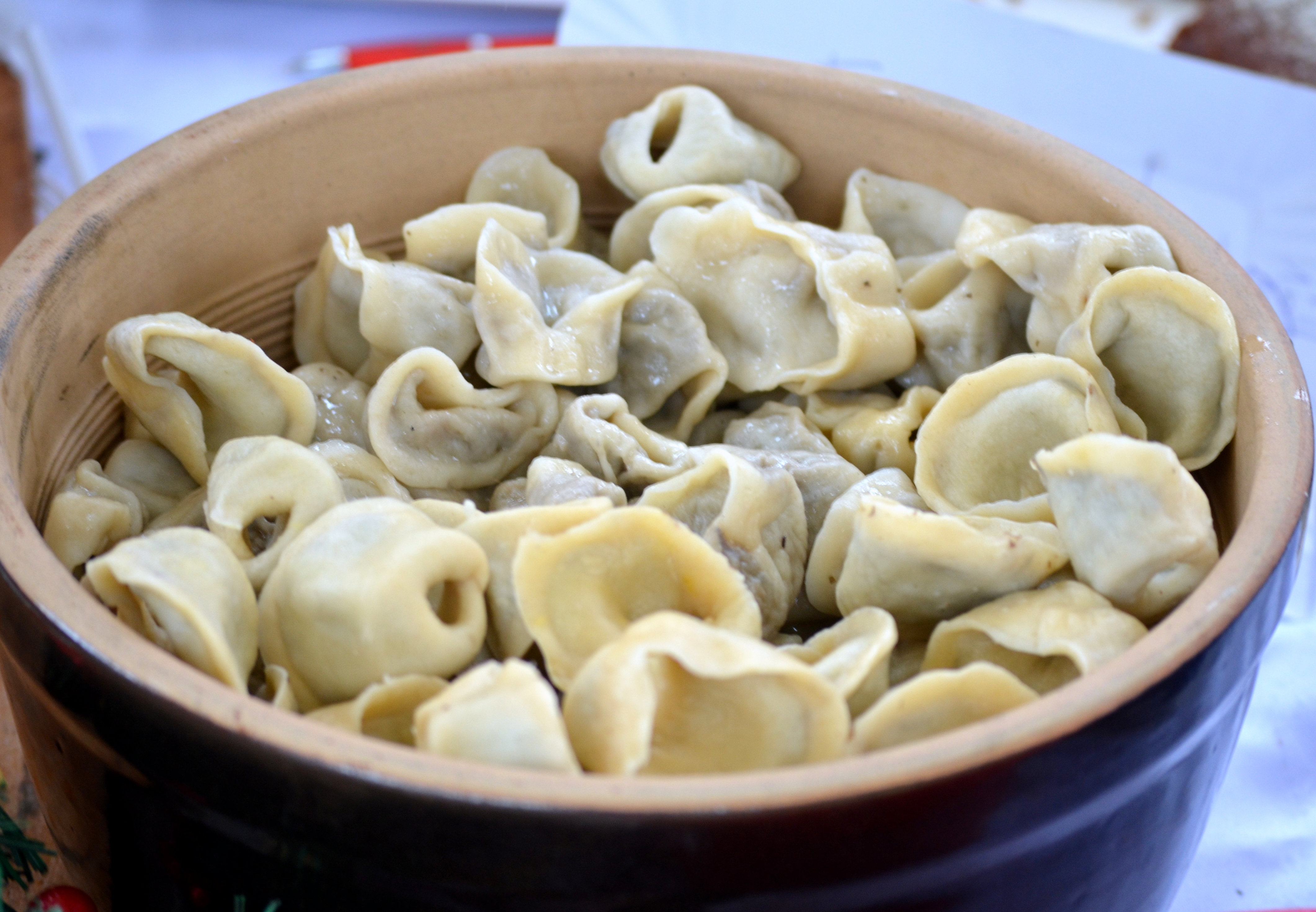 Adventkirmes 2014 in Sanok. Beskidische Teigtaschen.